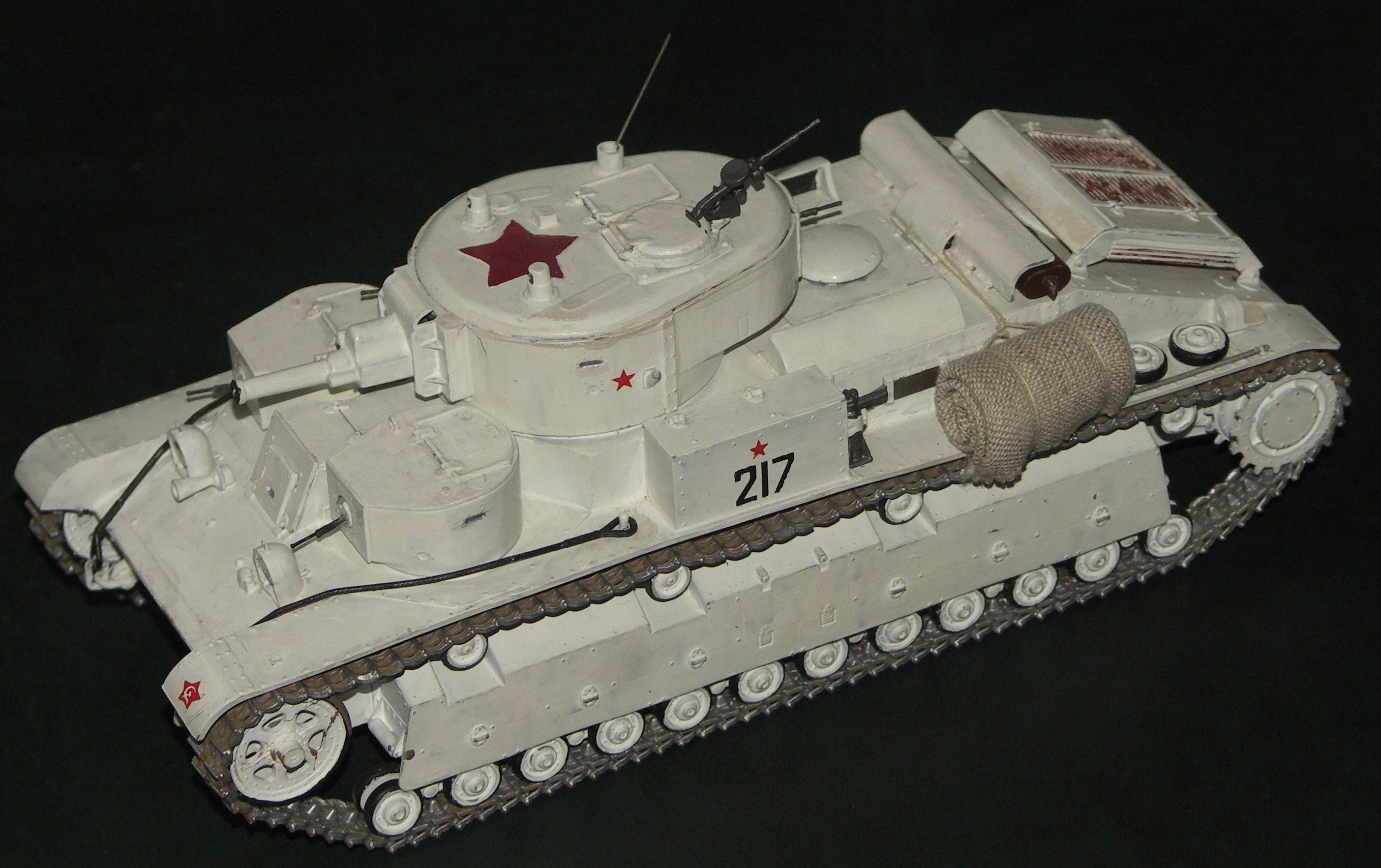 Модель танка Т-28 обр. 1938 года в масштабе 1:35, производства фирмы Alanger